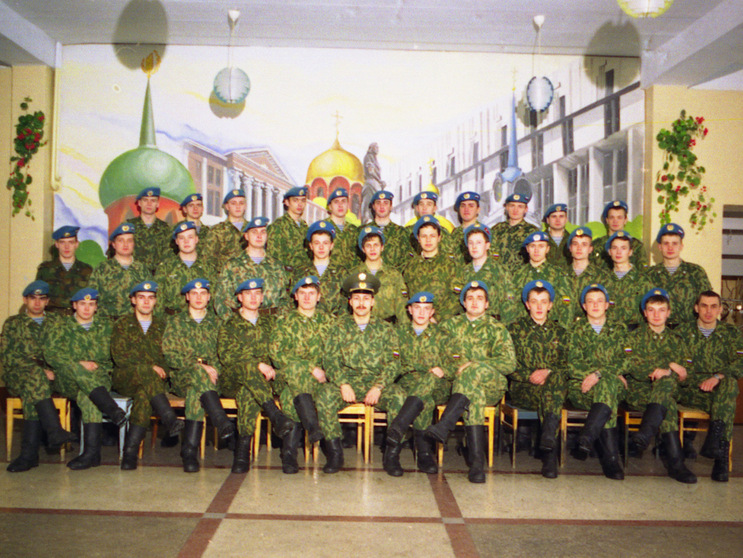 Курсанты ВДВ — первый выпуск. 1999 год.